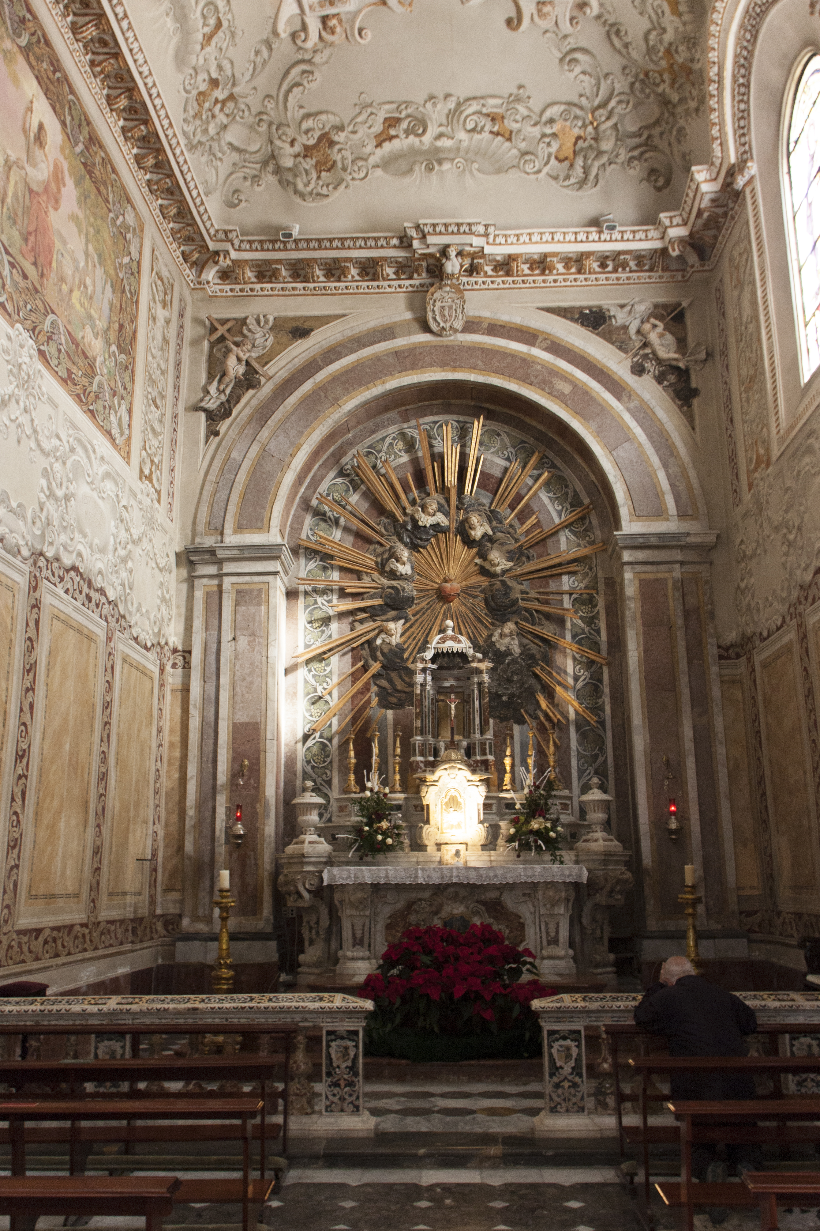 Cappella della Cattedrale di Mazara